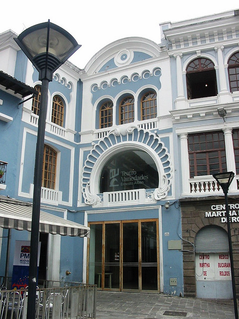 Teatro Variedades, ubicado en la Plaza del teatro, diagonal al Teatro Nacional Sucre, Quito